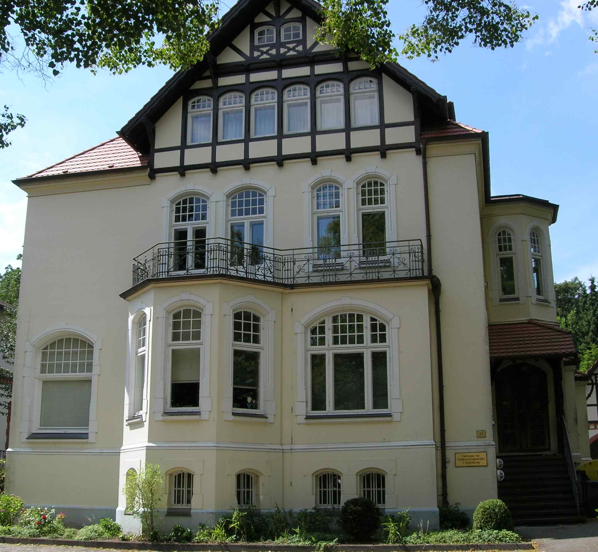 Bildbeschreibung